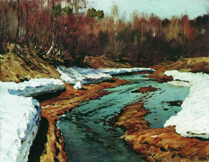 Весна. Последний снег